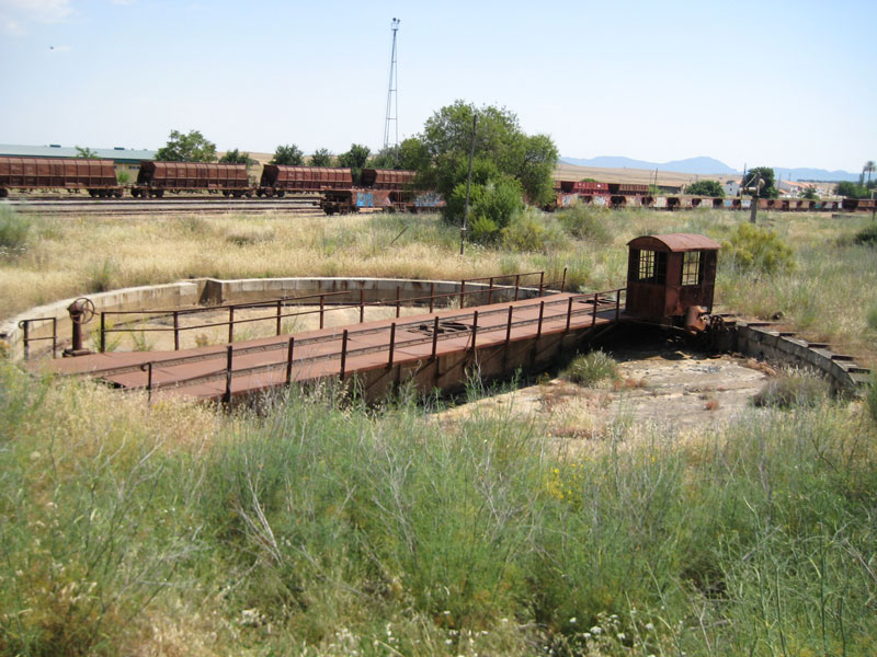 Antigua placa giratoria del Depósito de locomotoras de Almorchón..